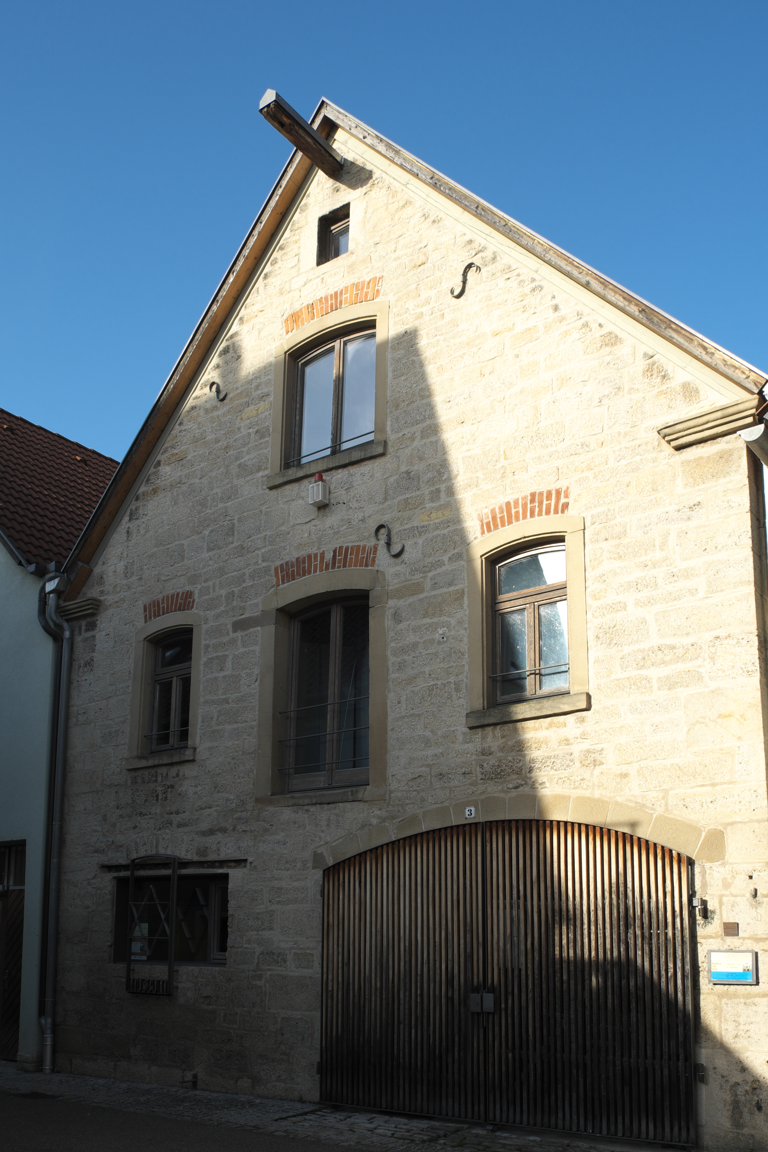 Jüdisches Museum in Creglingen im Main-Tauber-Kreis (Baden-Württemberg)